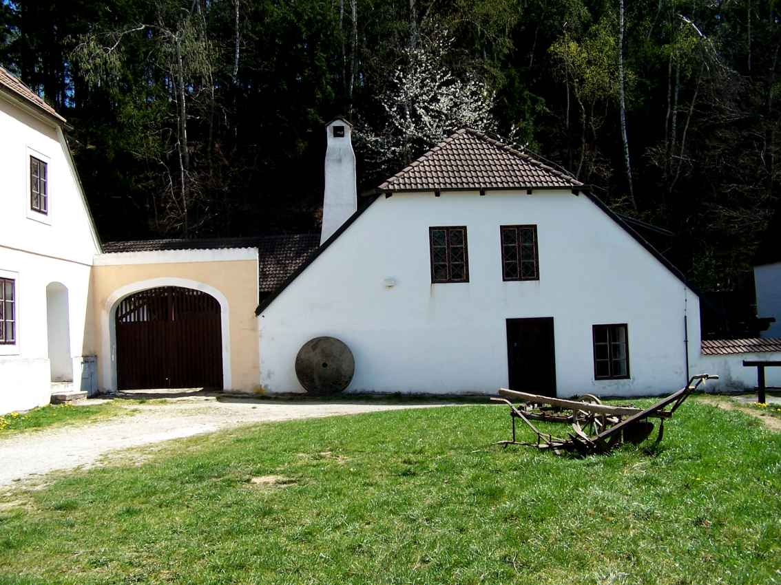 Buškův hamr u Trhových Svin, usedlost Bušků hamr s mlýnským kolem